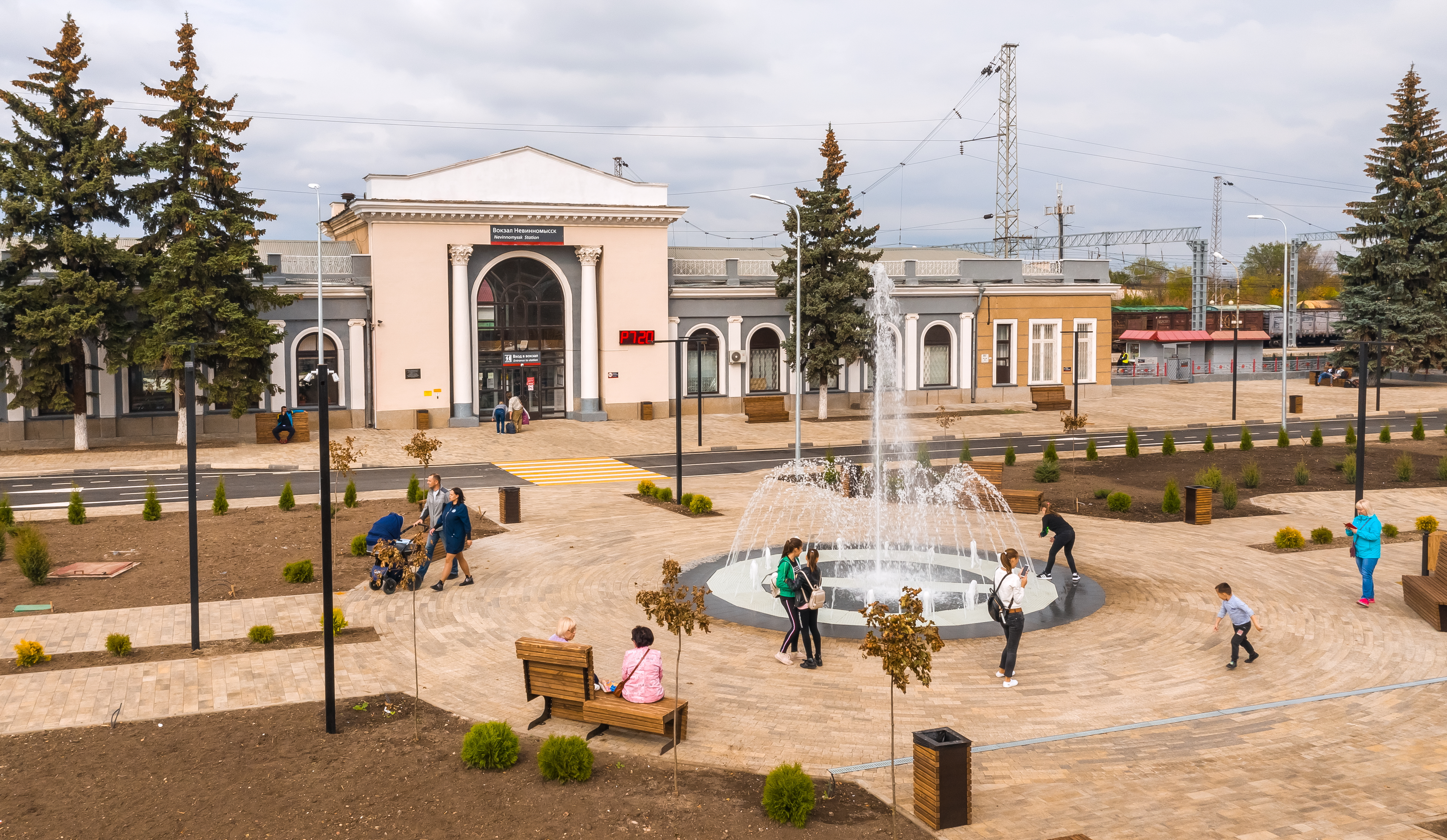 Обновленная привокзальная площадь в г. Невинномысске